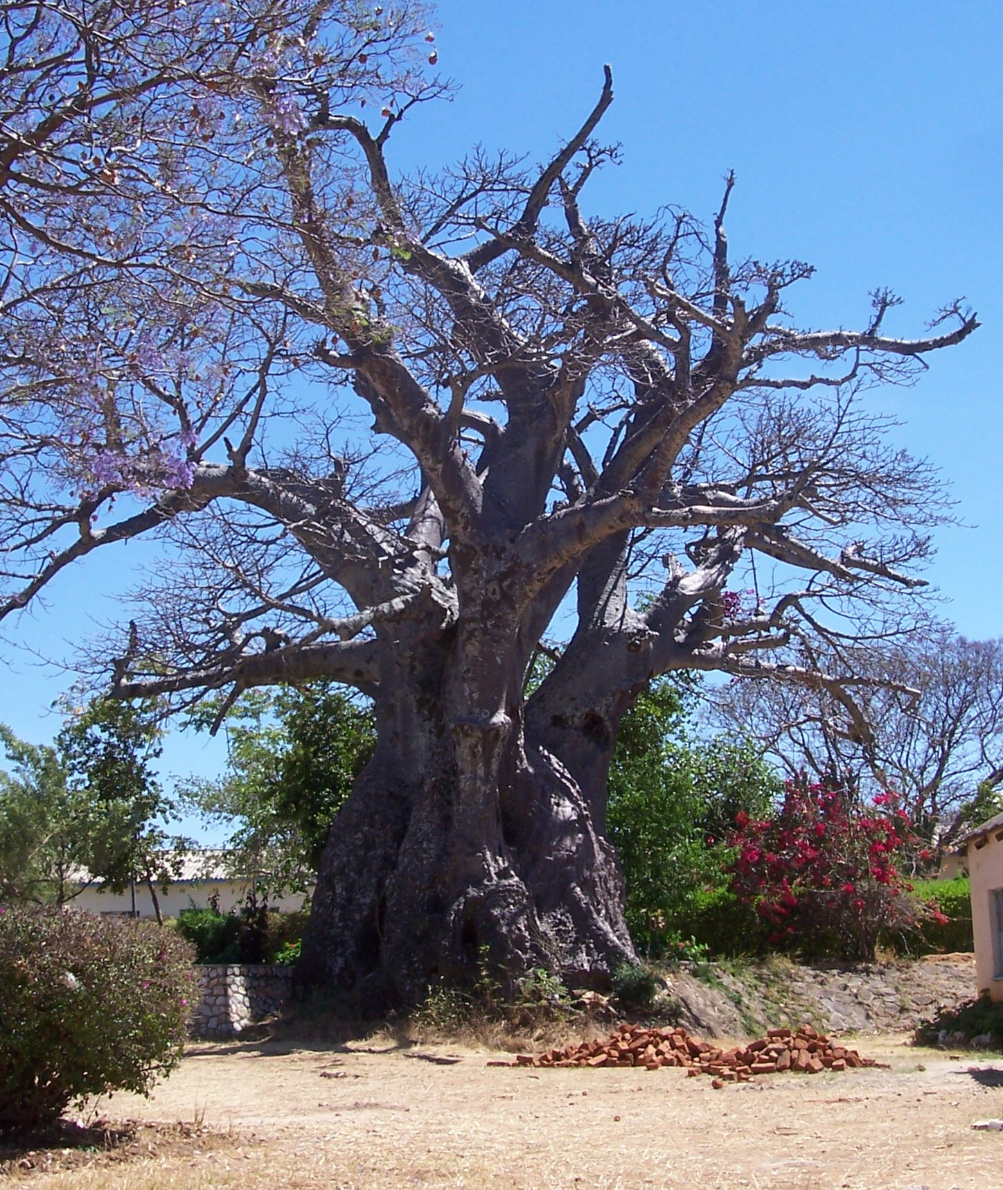 Old Baobab (Adansonia digitata) in Nyanga school grounds, Zimbabwe